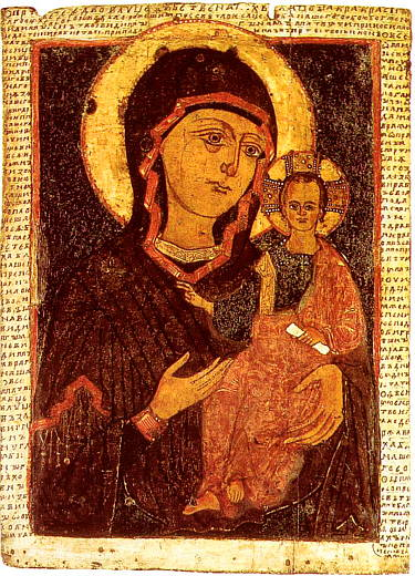 Икона Божией Матери ОдигитрияСредняя Русь. Из коллекции С. П. Рябушинского